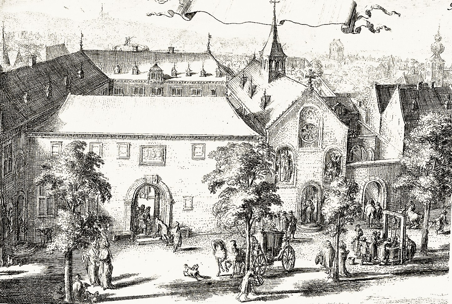 Domizil der Deutsch-Ordens-Kommende St. Gilles in Aachen (um 1700). Im Vordergrund die alte Pontstraße, links die innere Stadtmauer. Rechts vom Innenhof des Deutschordenshaus steht die Ägidiuskapelle.